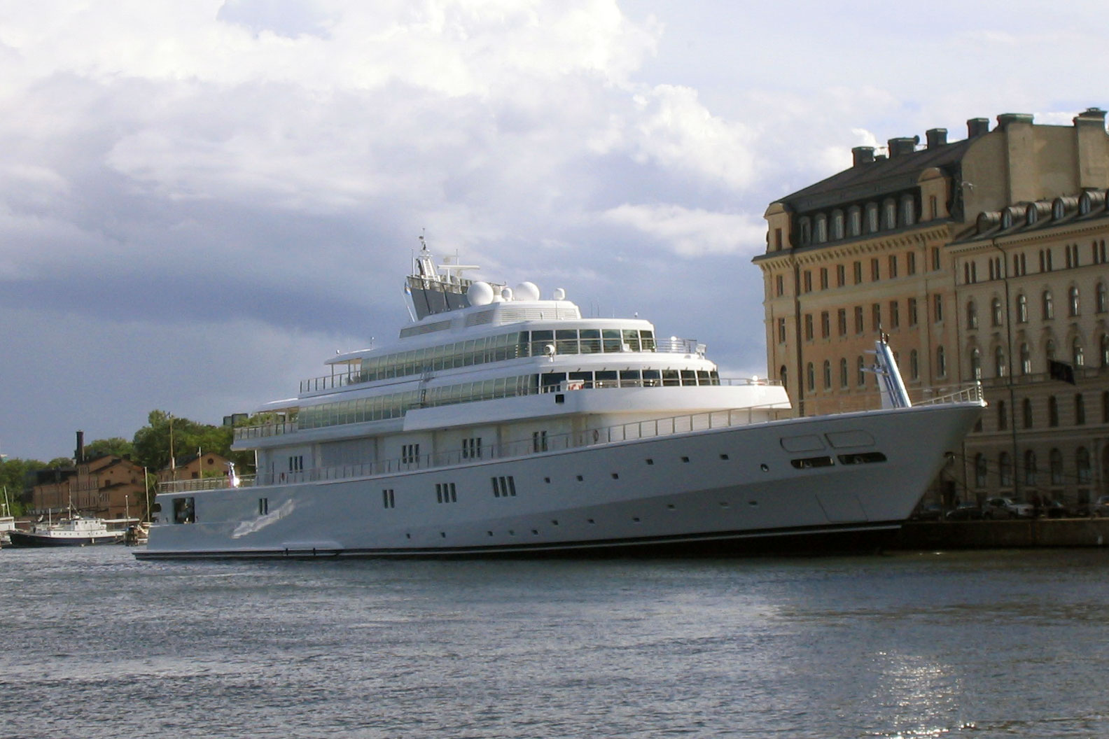 Zweitgrösste Yacht der Welt von Larry Ellison